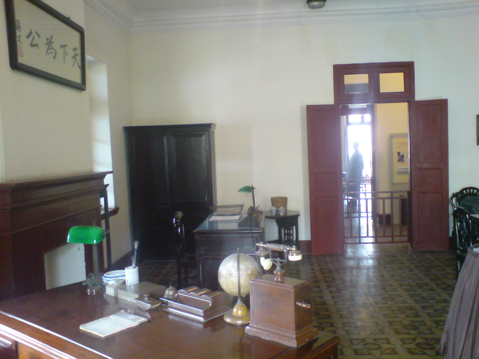 大元帥府孫中山辦公室